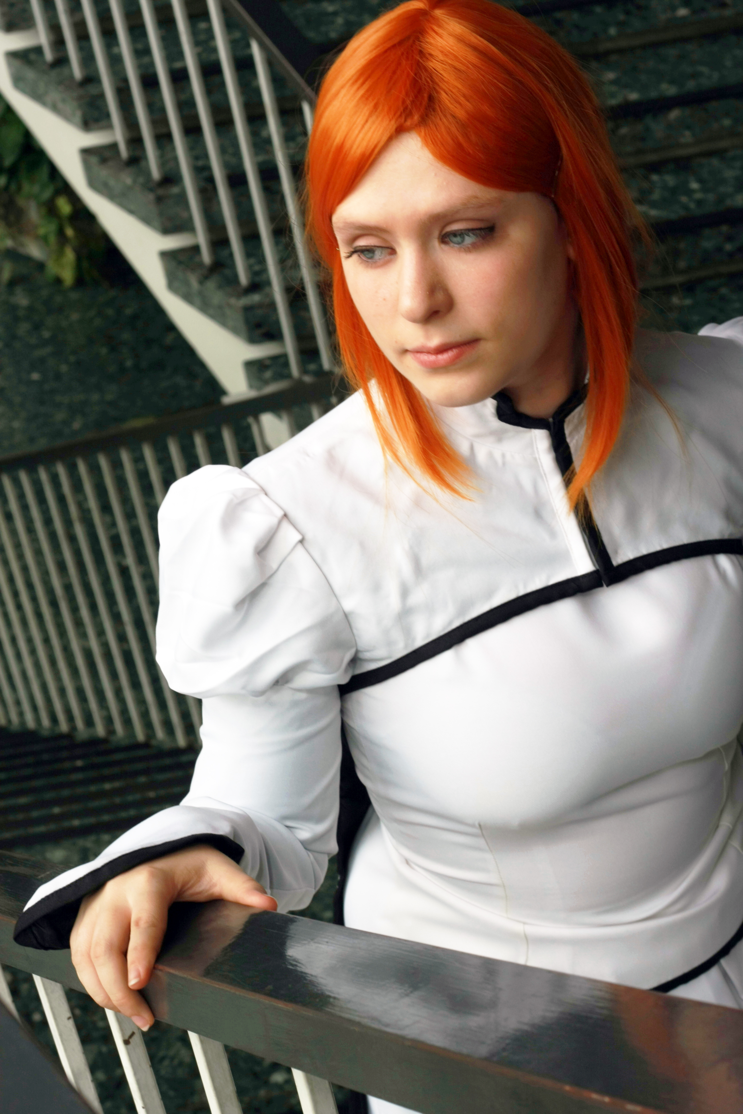 Orihime Inoue (Arrancar)